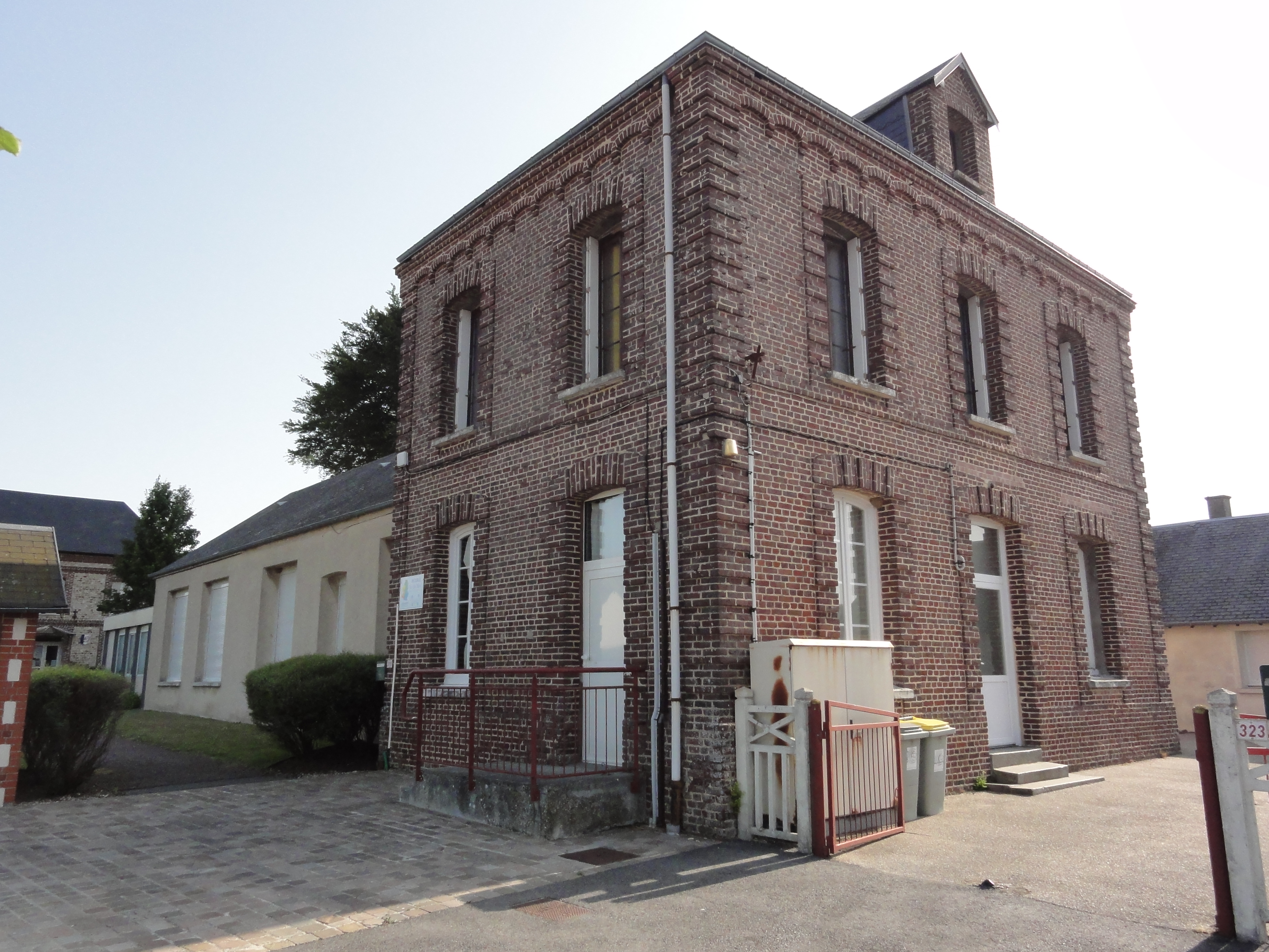 Bernières (Seine-Mar.) école